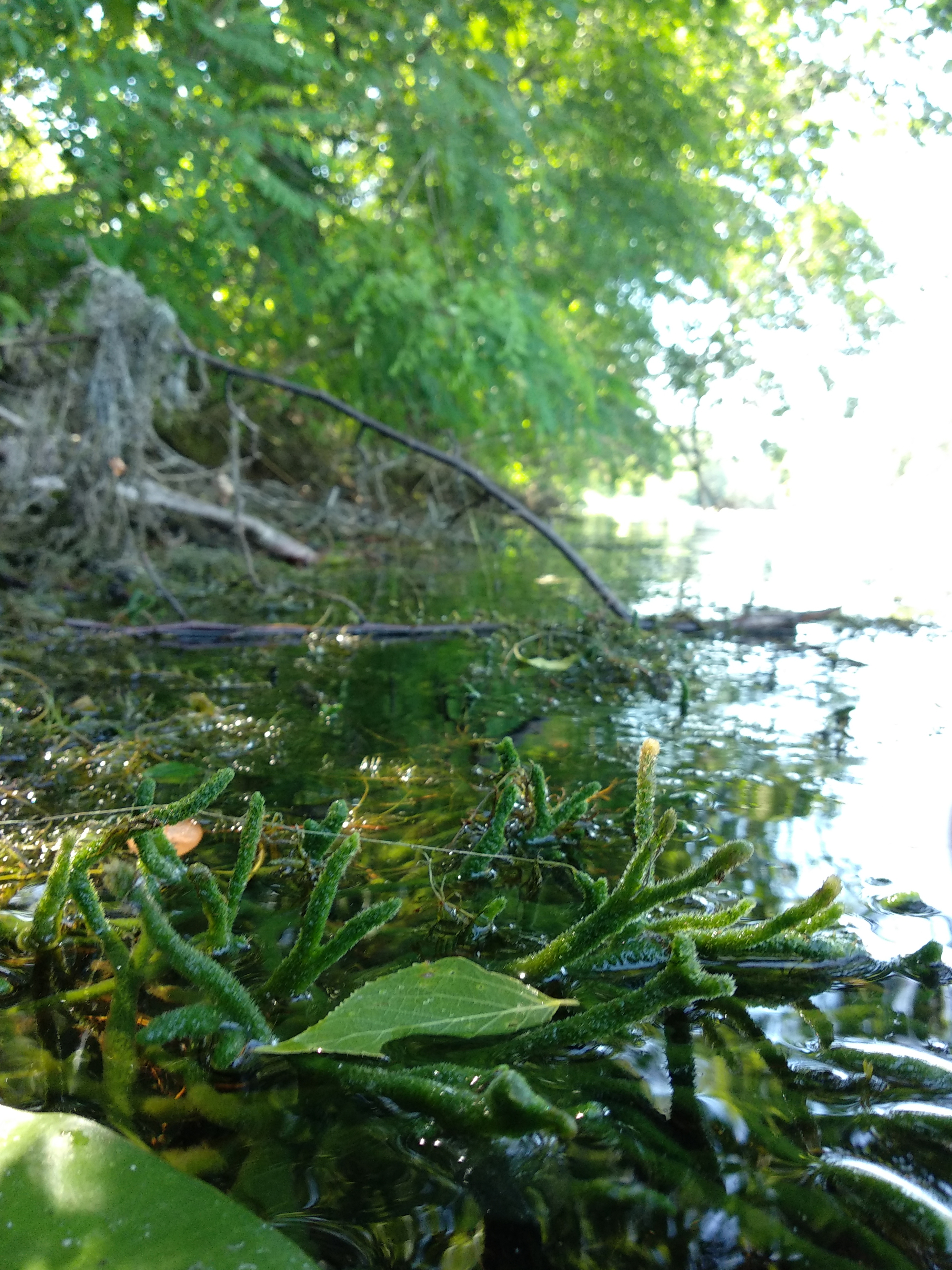 Дніпровсько-Орільський, Дніпропетровський та Петриківський райони, Орільське лісництво